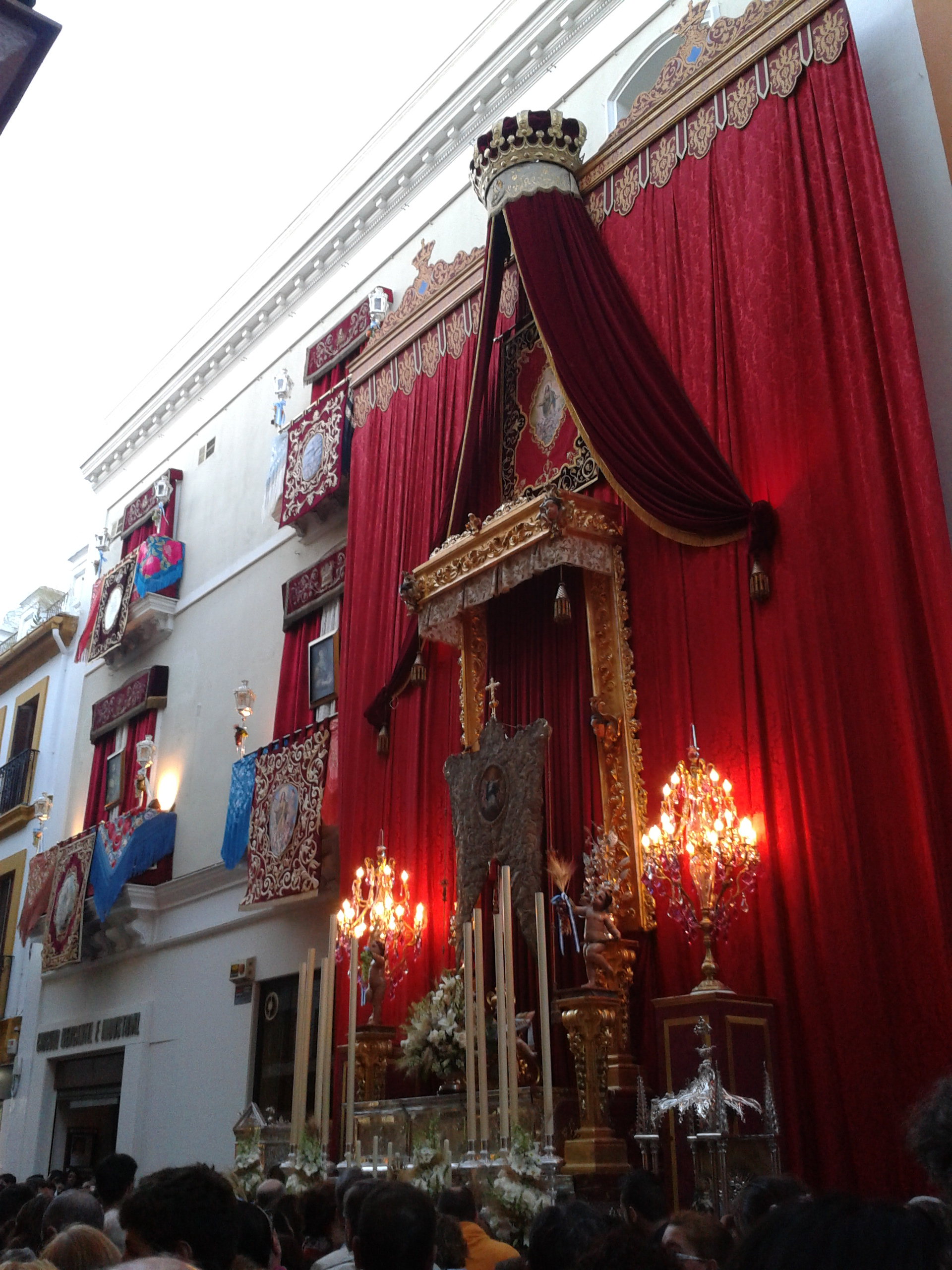 Altar Corpus Christi Sevilla